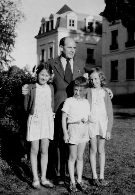 "L'Audronnière, colonie de vacances du Syndicat des Métaux, à Faverolles sur Cher (41)